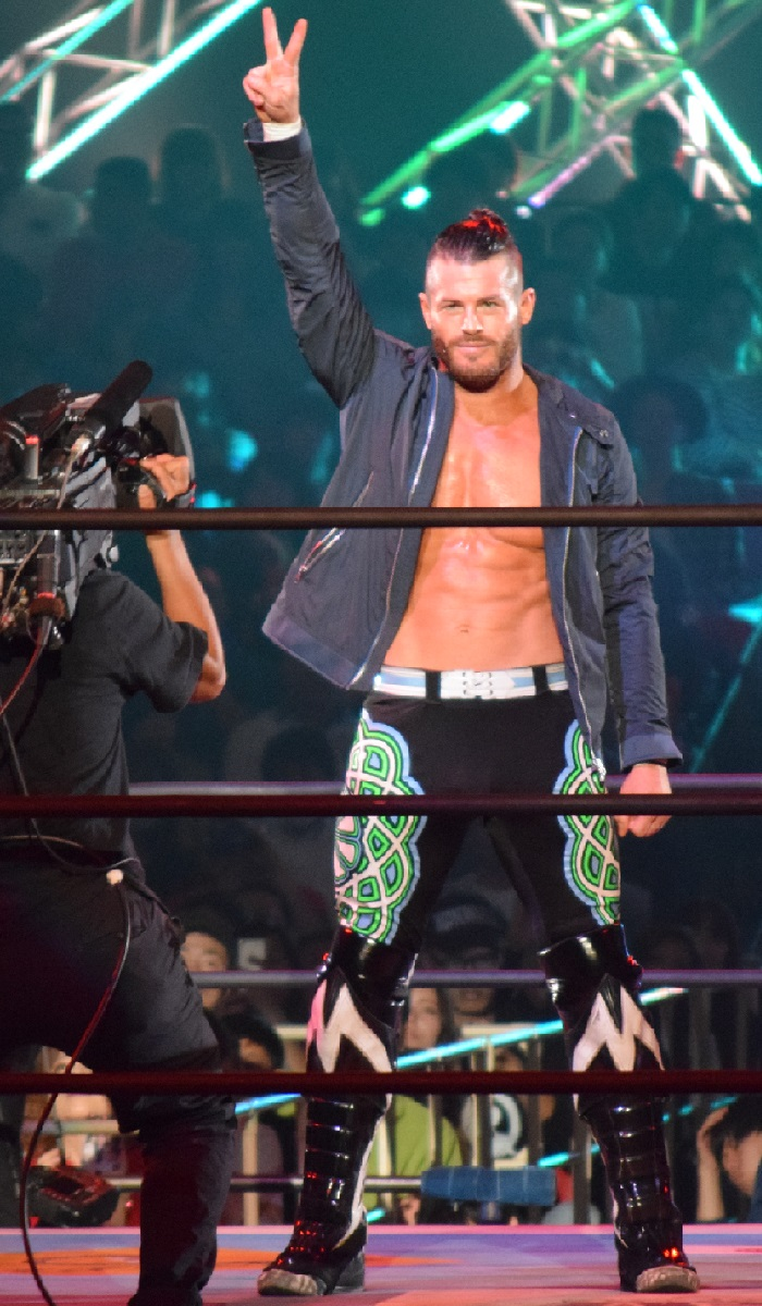 2015年11月7日 大阪府立体育会館 「POWER STRUGGLE」 マット・サイダル